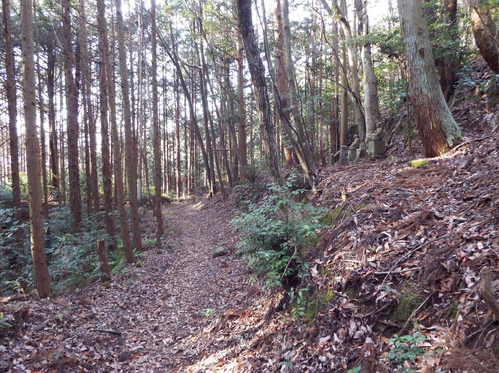 龍光寺からの仏木寺道